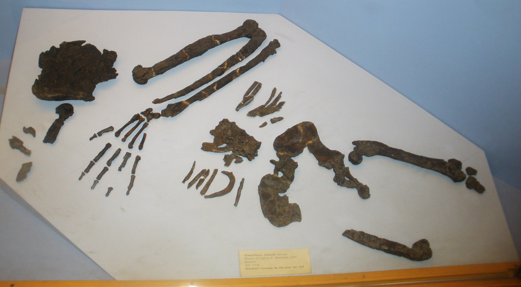 Fossil of Oreopithecus, IGF 11778, an extinct mammal- Took the picture at Museo di Paleontologia di Firenze